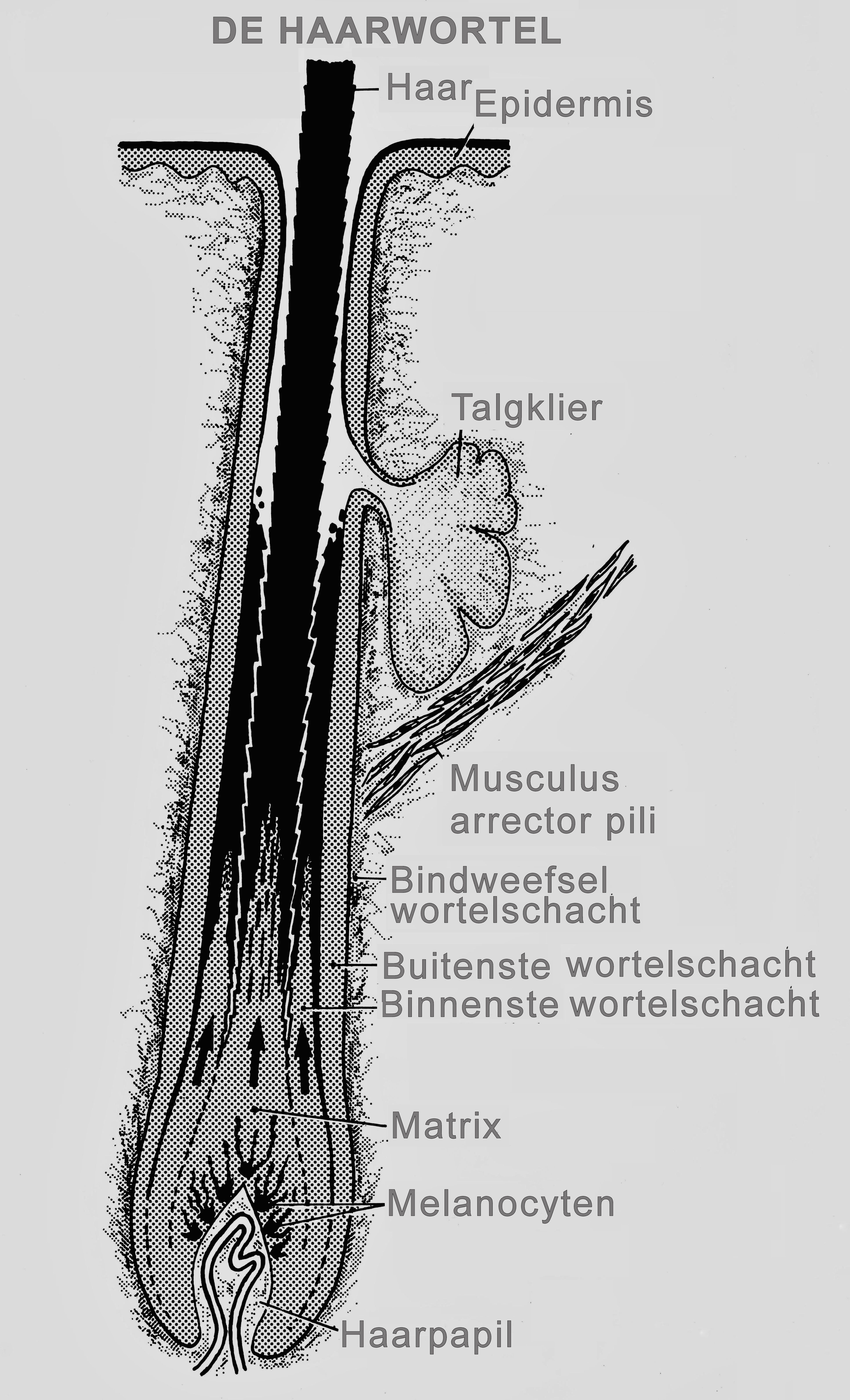 Schematischer Längsschnitt der Haarwurzel